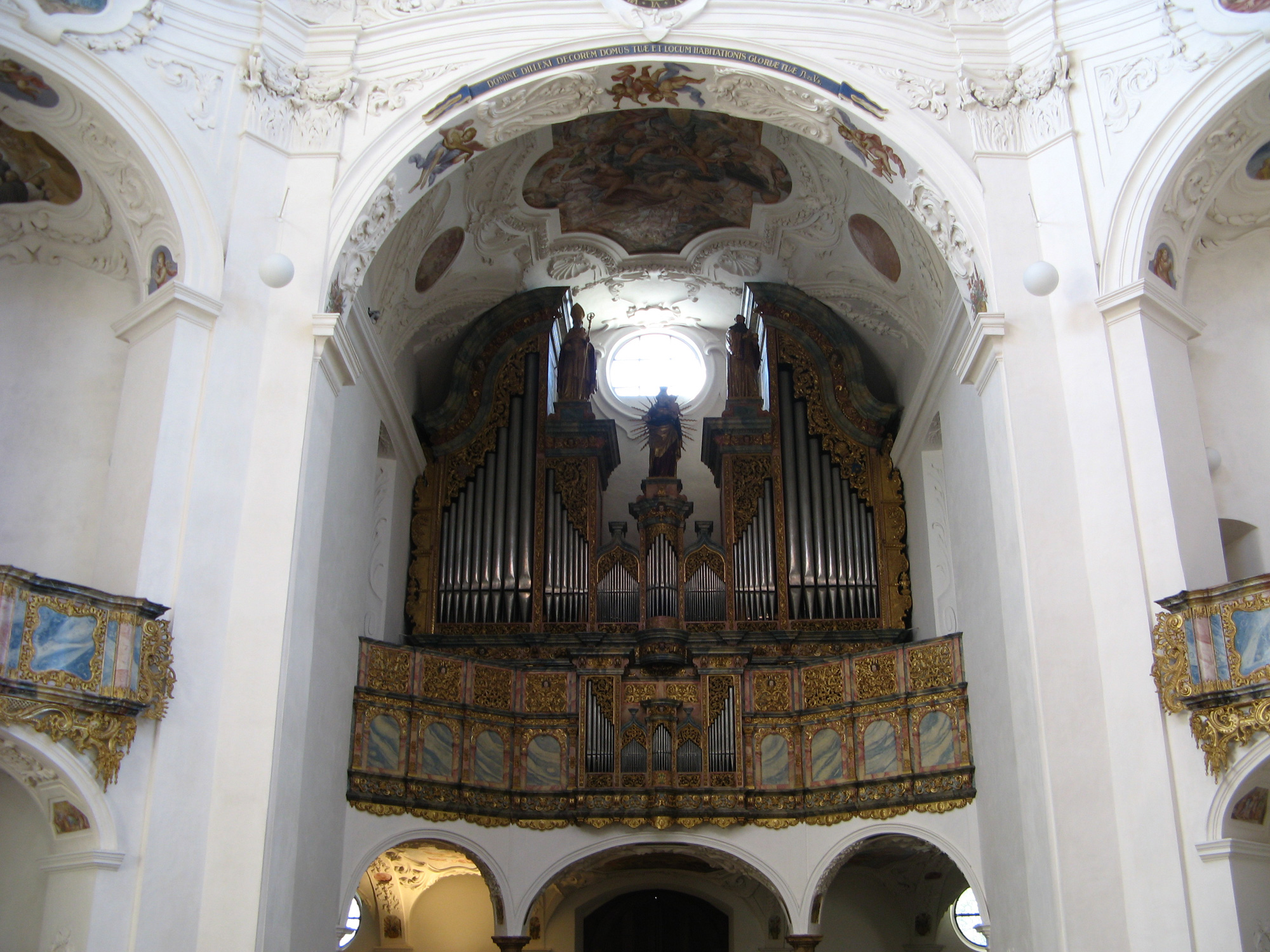 Grosse Orgel (erbaut 1630) in der Klosterkirche Muri